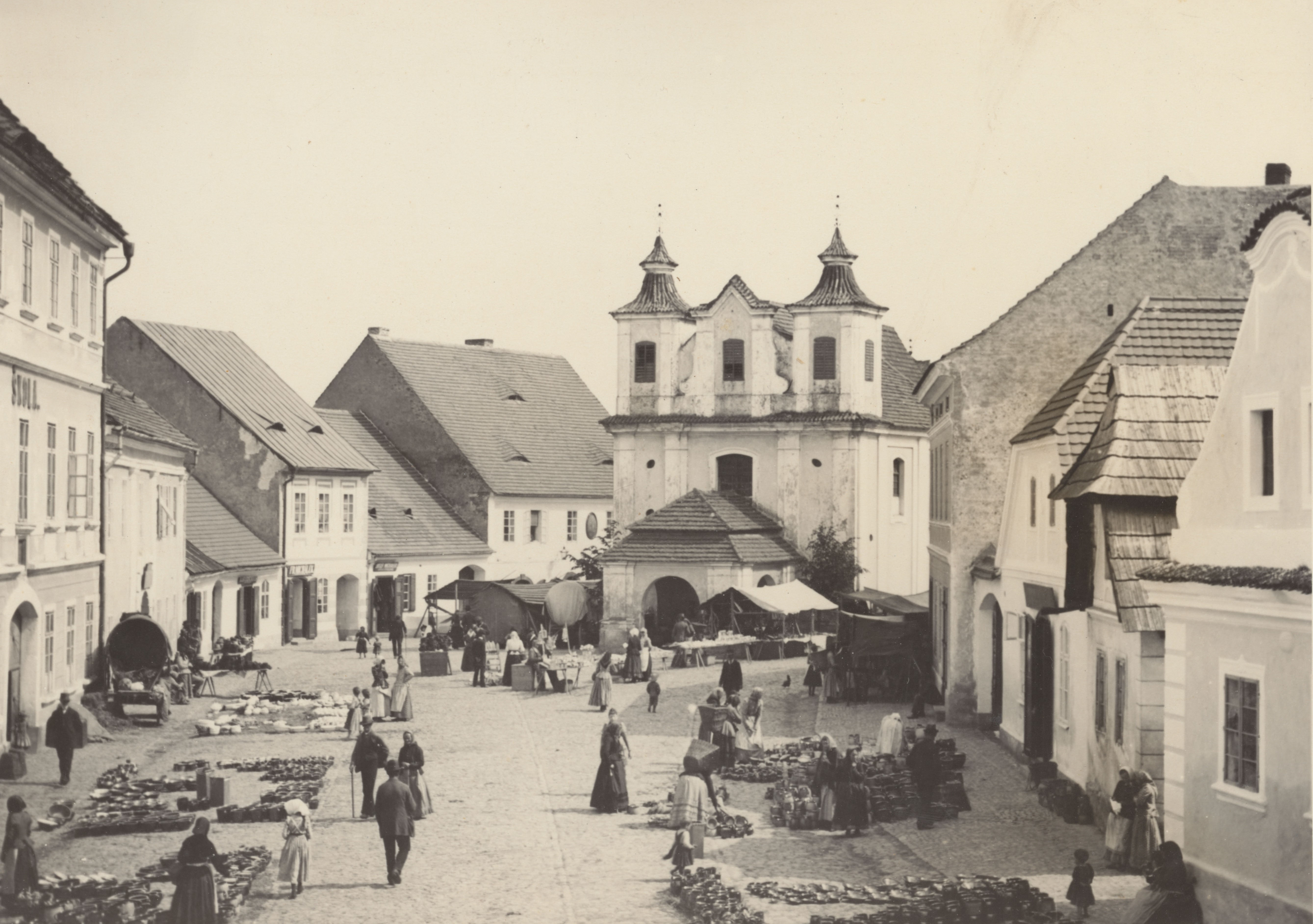 Náměstí v Rožmitále pod Třemšínem kolem roku 1890